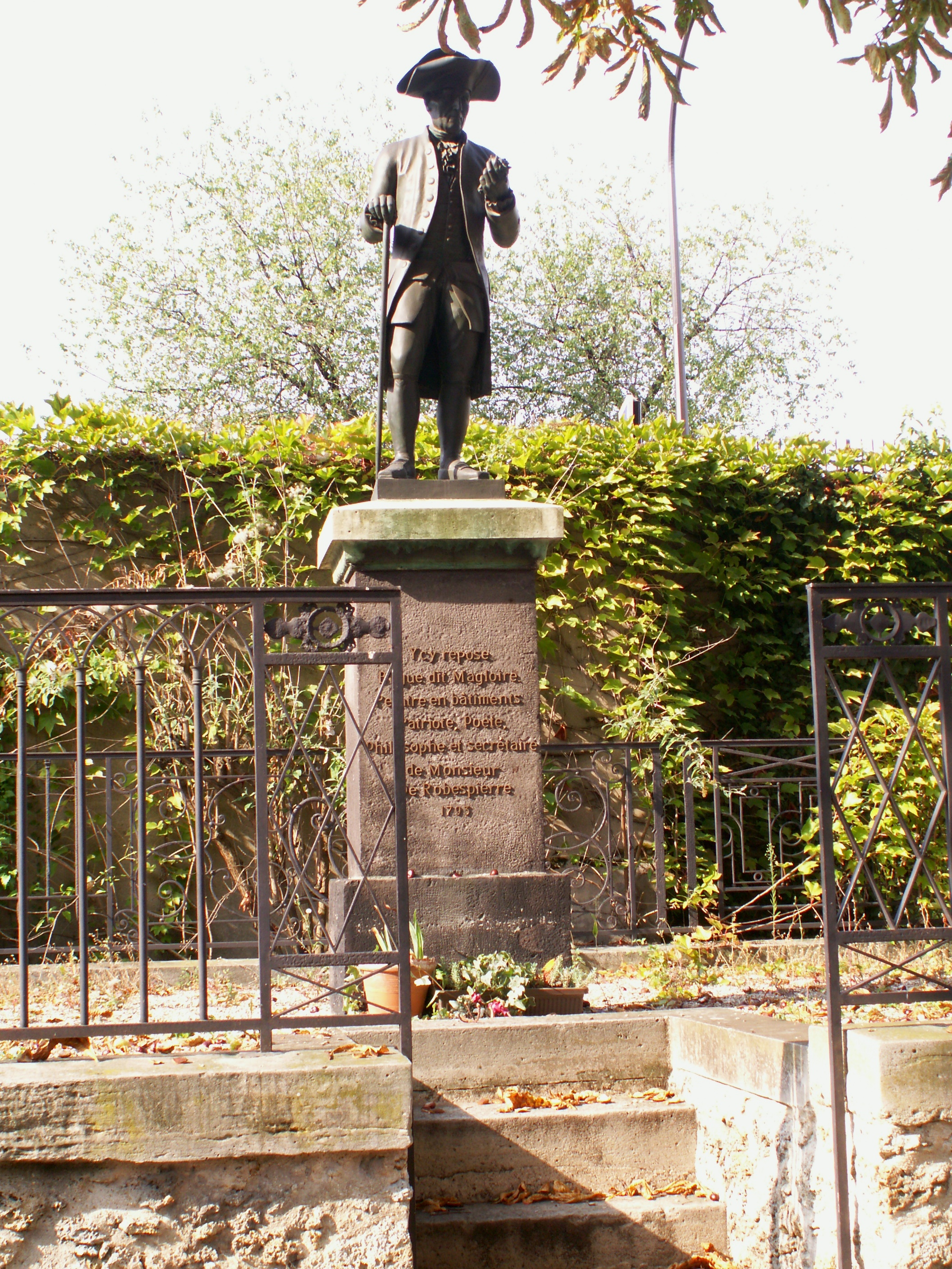 Tombe de Bègue au cimetière de Charonne, Paris. L'épitaphe est le suivant : "Ycy repose Bègue dit Magloire, Peintre en bâtiments, Patriote, Poëte, Philosophe et secrétaire de Monsieur de Robespierre 1793".